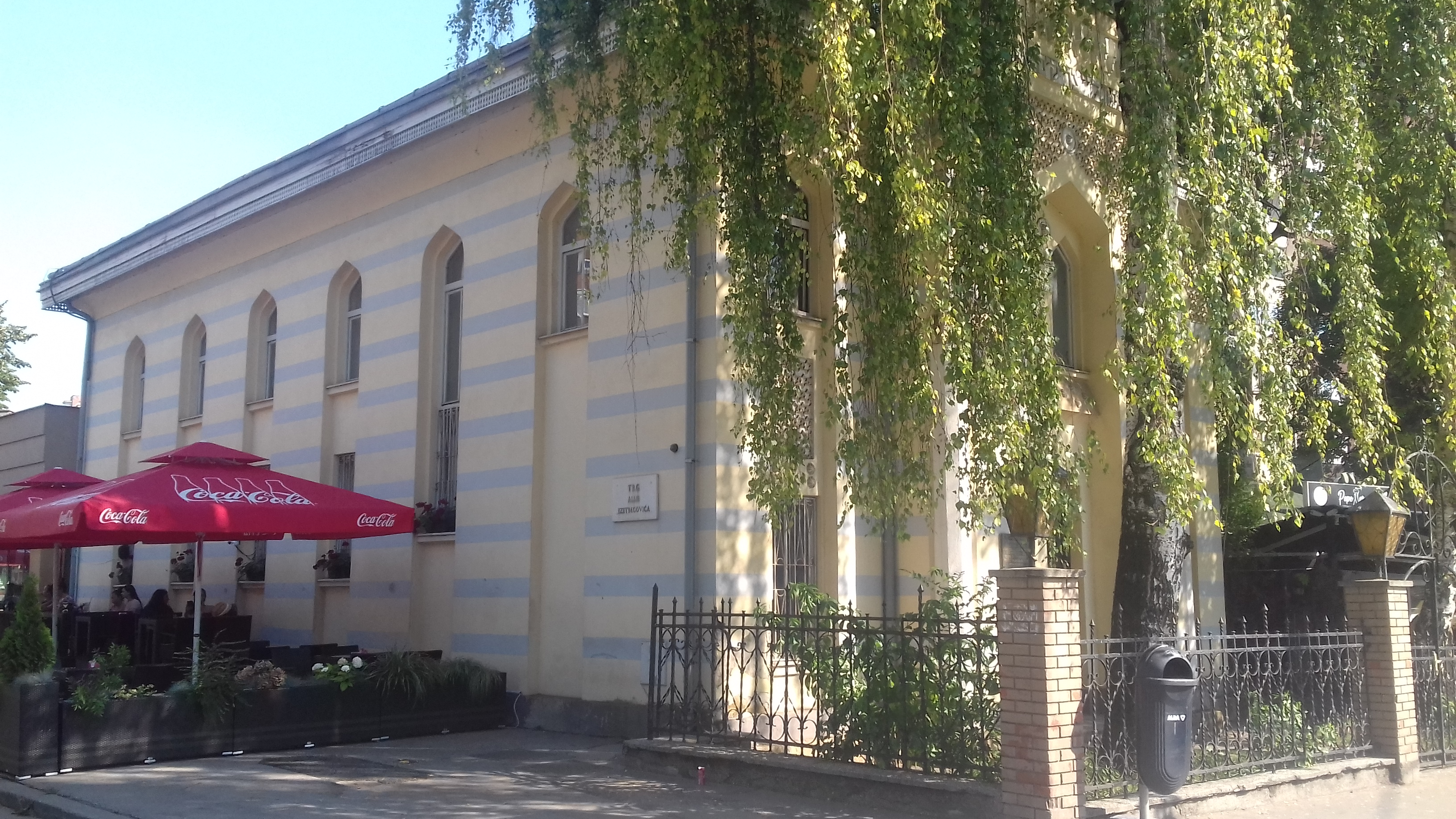 Зеница, улице/зграде